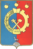 Герб Мичуринска (1969), Тамбовская область